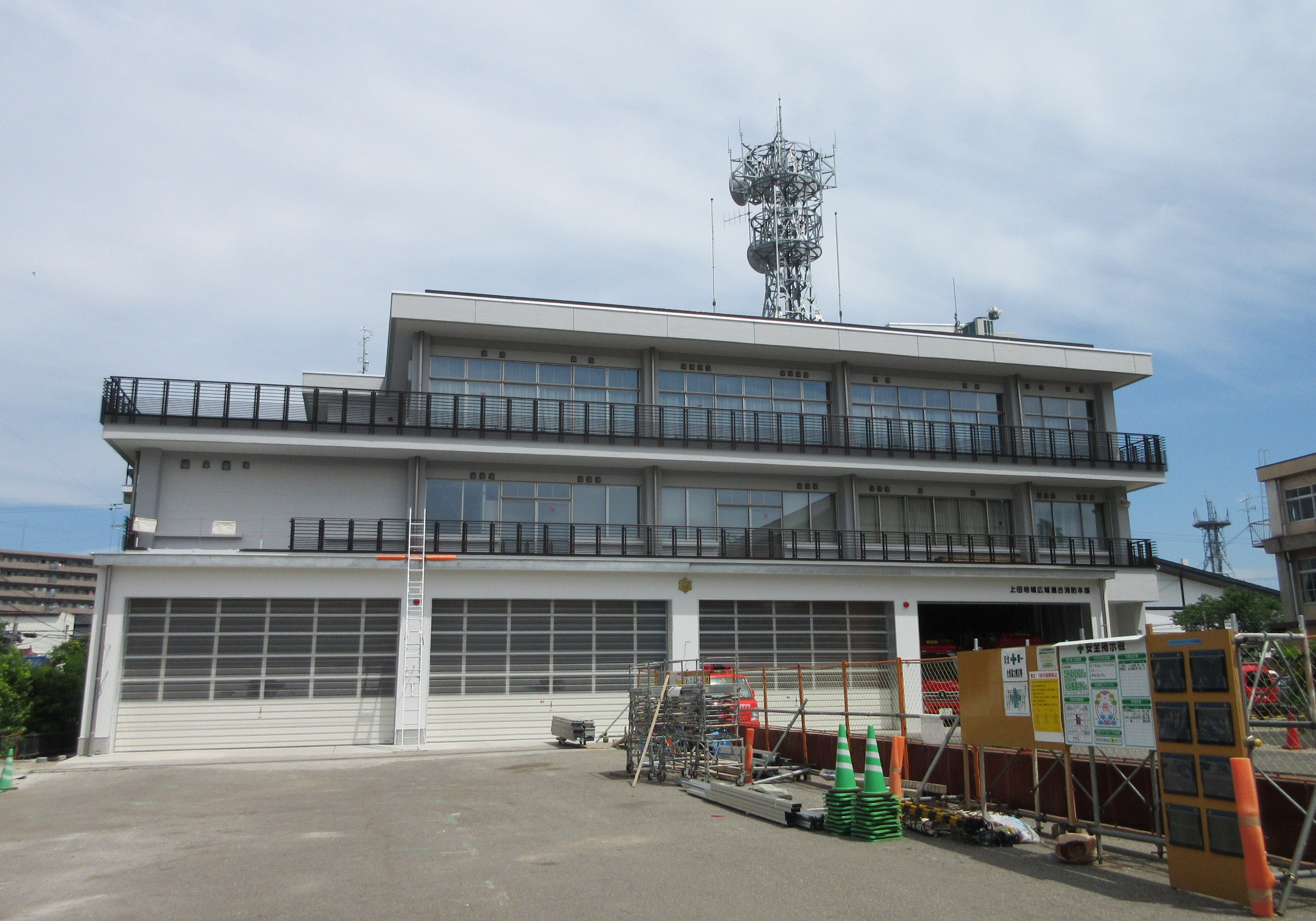 上田地域広域連合消防本部